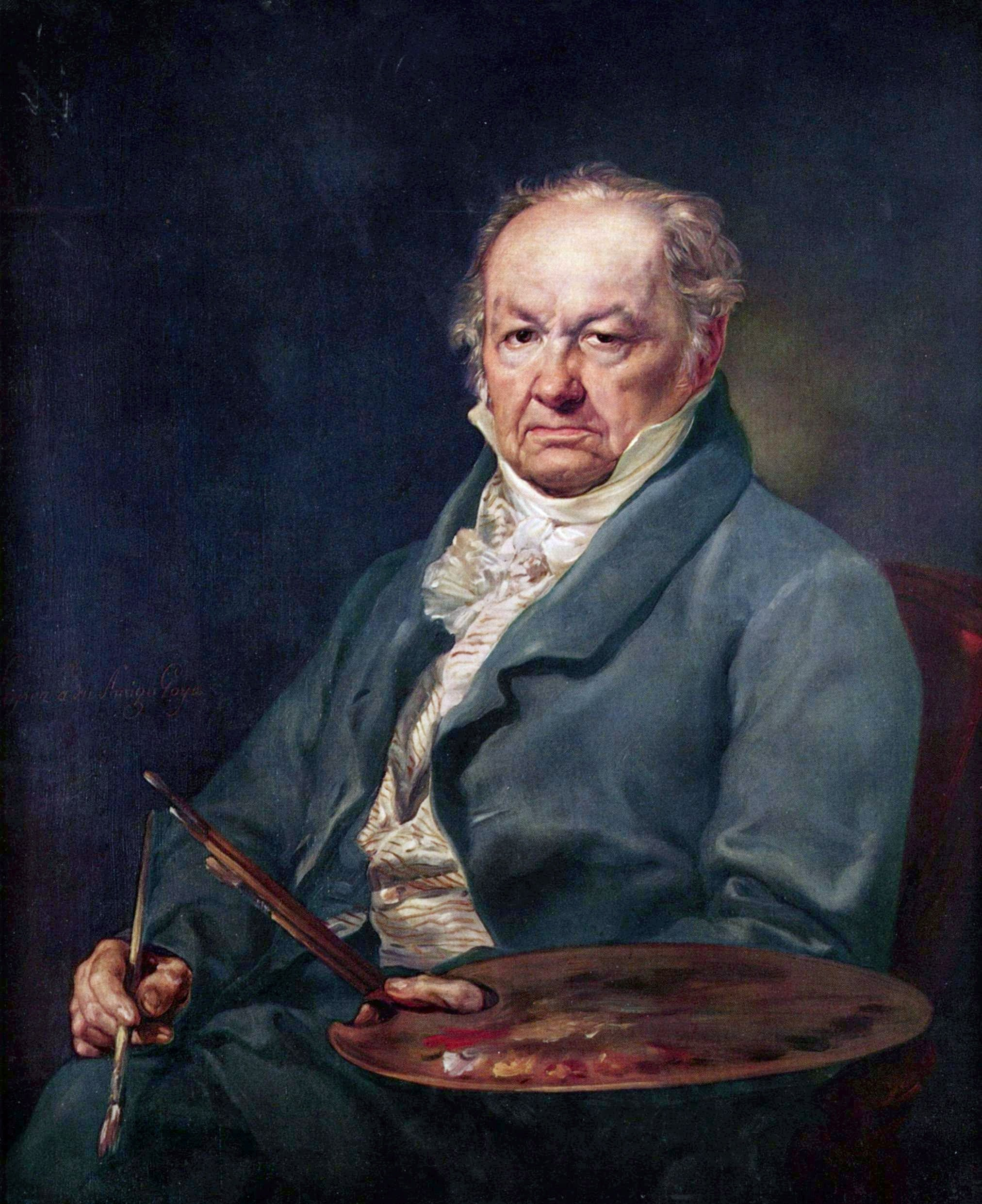 Retrato del pintor español Francisco de Goya y Lucientes (1746-1828).